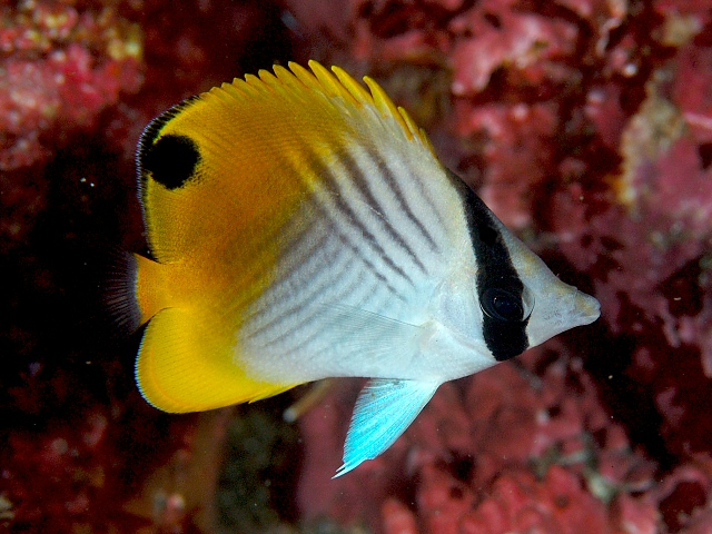 トゲチョウチョウウオ Chaetodon auriga